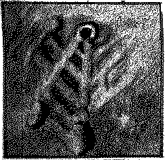 Общий вид Города на рисунке Груйтуйзена